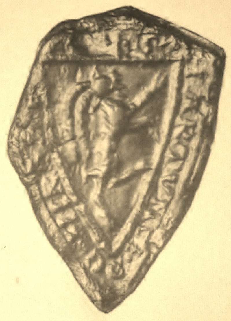 Siegel des Hartung von Kirchberg (1288) (S'.HARTVNGI.DE.KIR....) In: Otto Posse: Die Siegel des Adels der Wettiner Lande. Band IV, Verlag Baensch Stiftung Dresden 1911, Tafel 20 Nr. 5